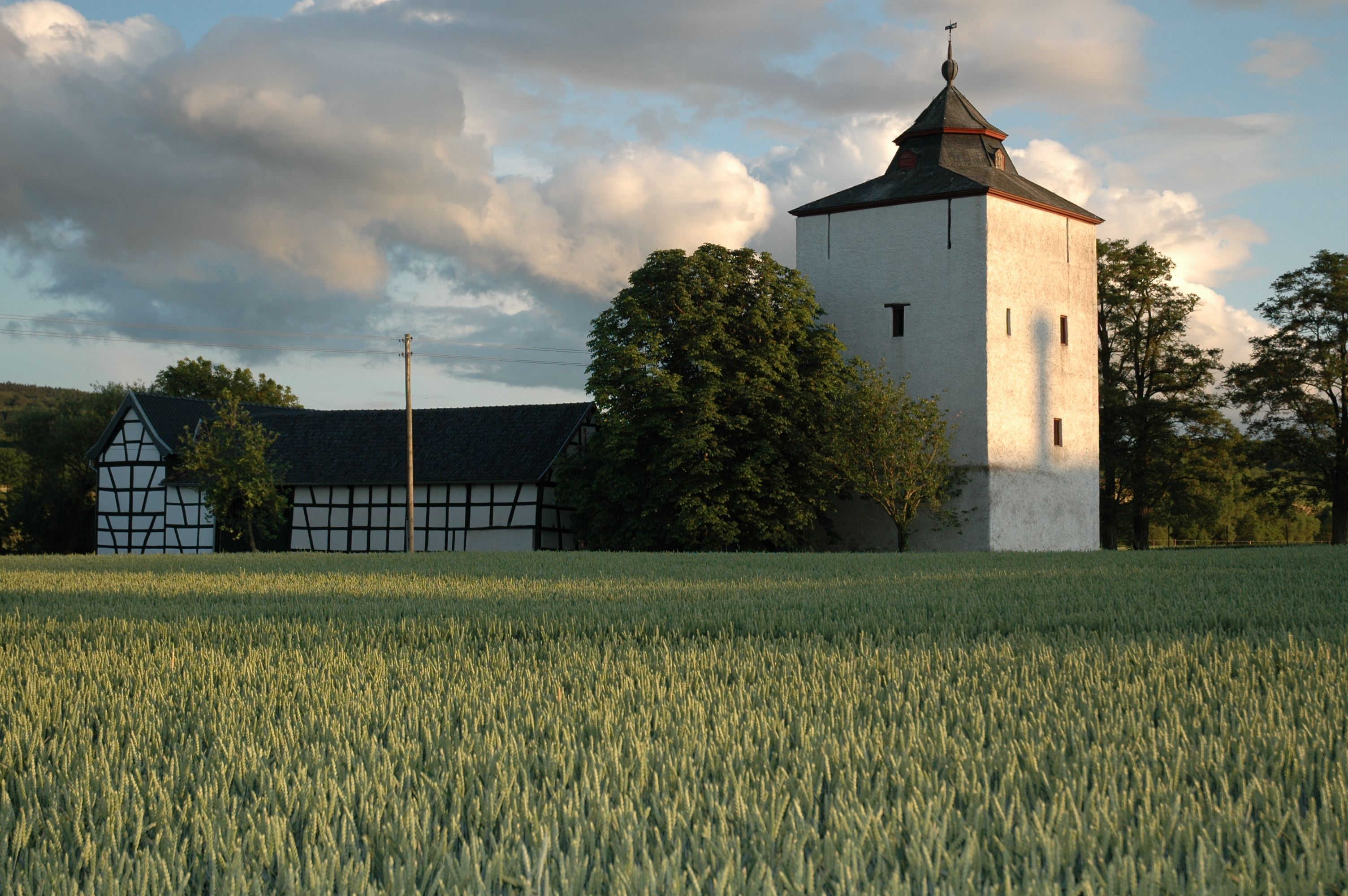 Burg Arloff mit Wohnturm und Nebengebäude